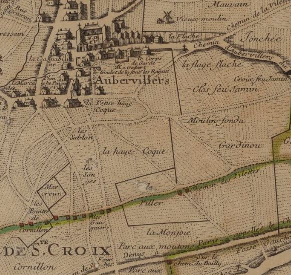 Saint-Denis.Inselin.1707.Haye-Coq.Gardinou